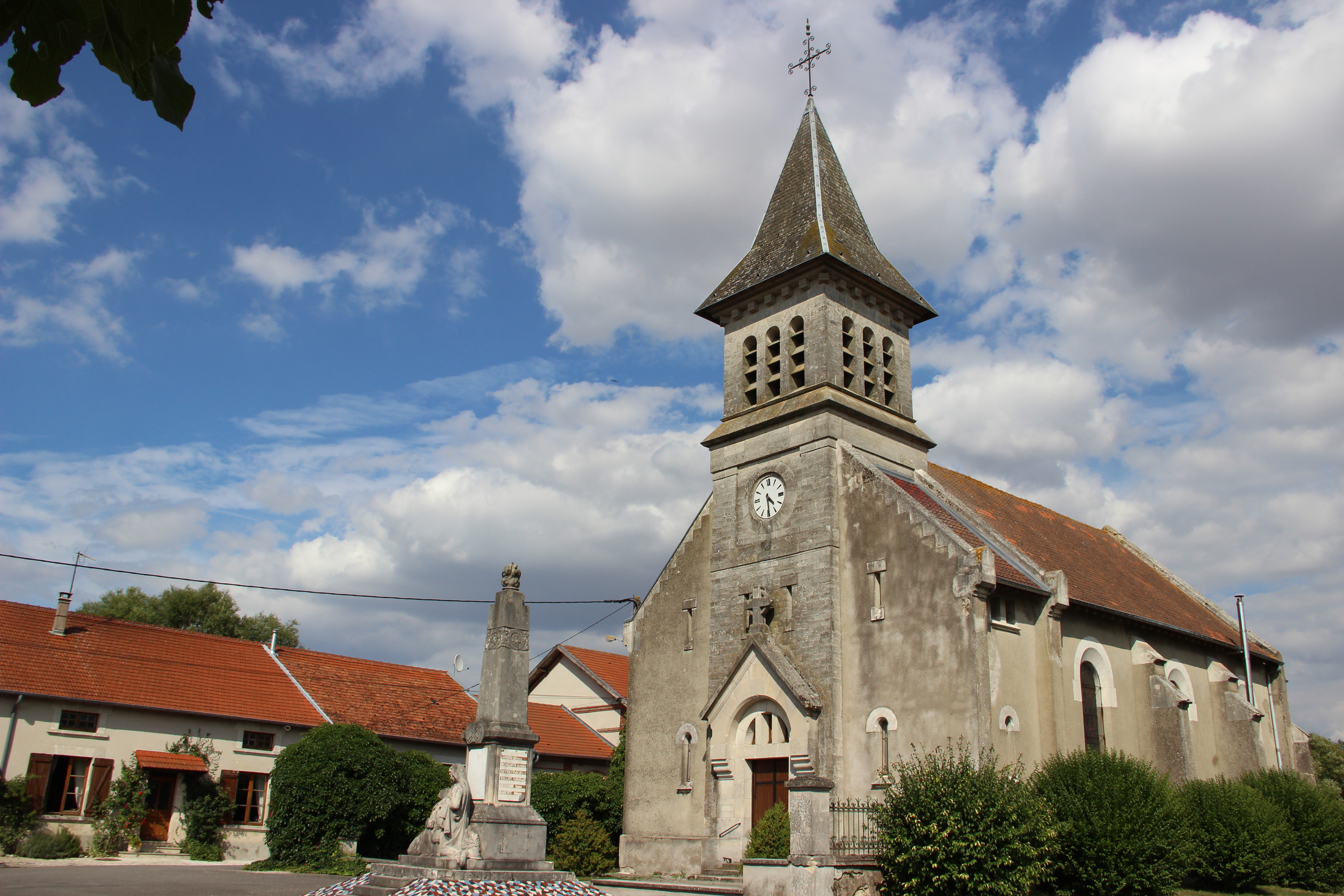 L'église Saint-Laurent